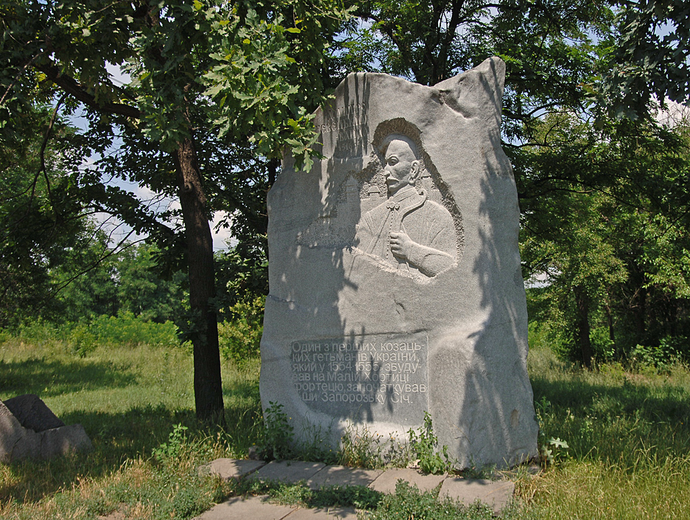 Достопримечательности Хортицы - Вишневецкий